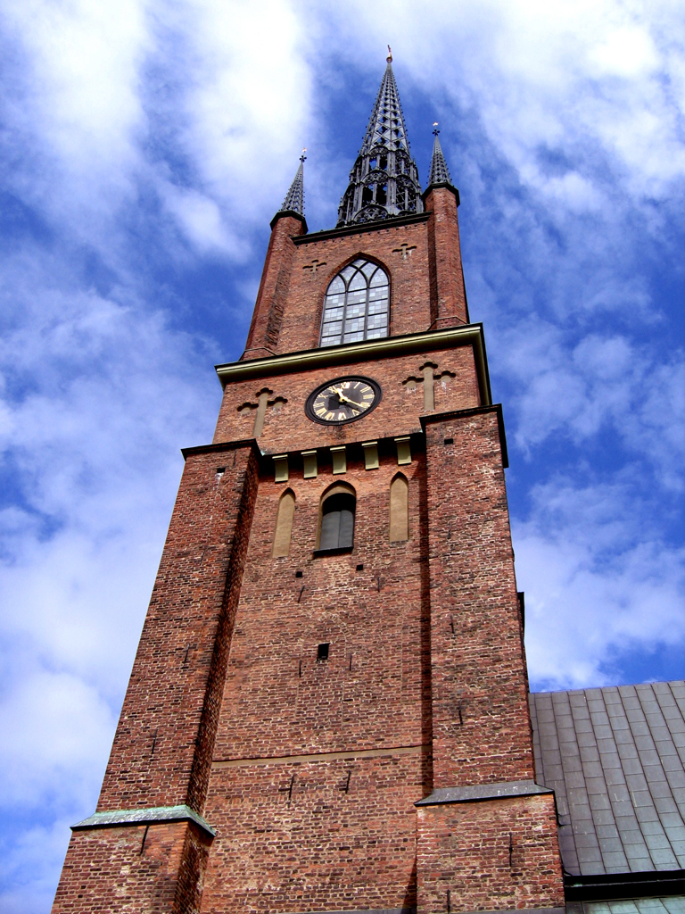 Riddarholmskyrkan